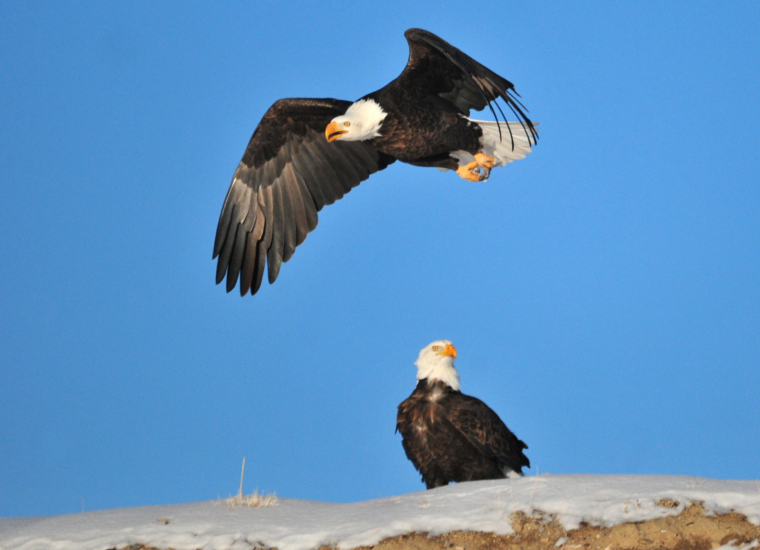 Photo: Tom Koerner/USFWS